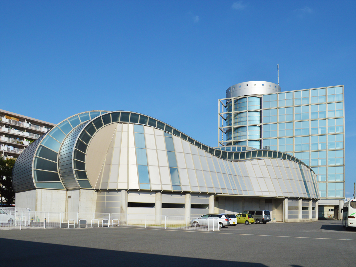 愛知県刈谷市の刈谷駅北口にある刈谷市産業振興センター